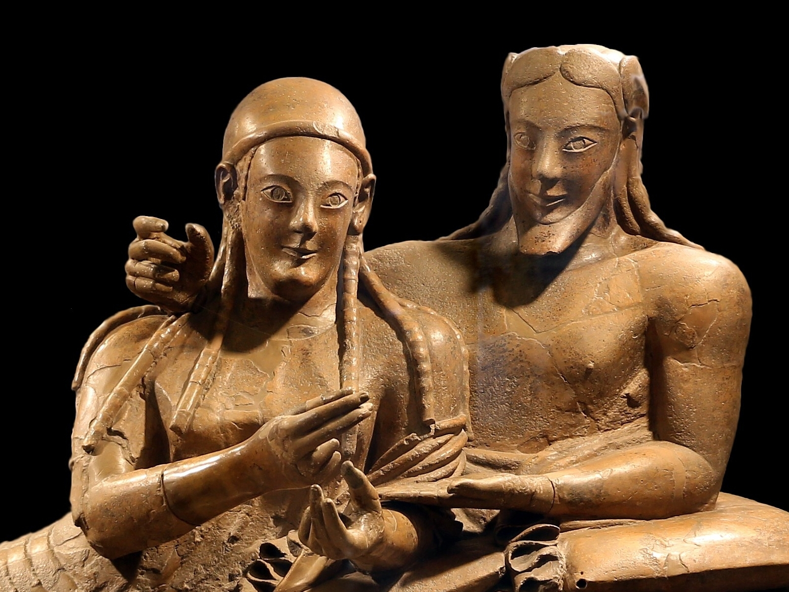 Sarcophagus of the Spouses from Caere, now in the National Etruscan Museum at Villa Giulia in Rome